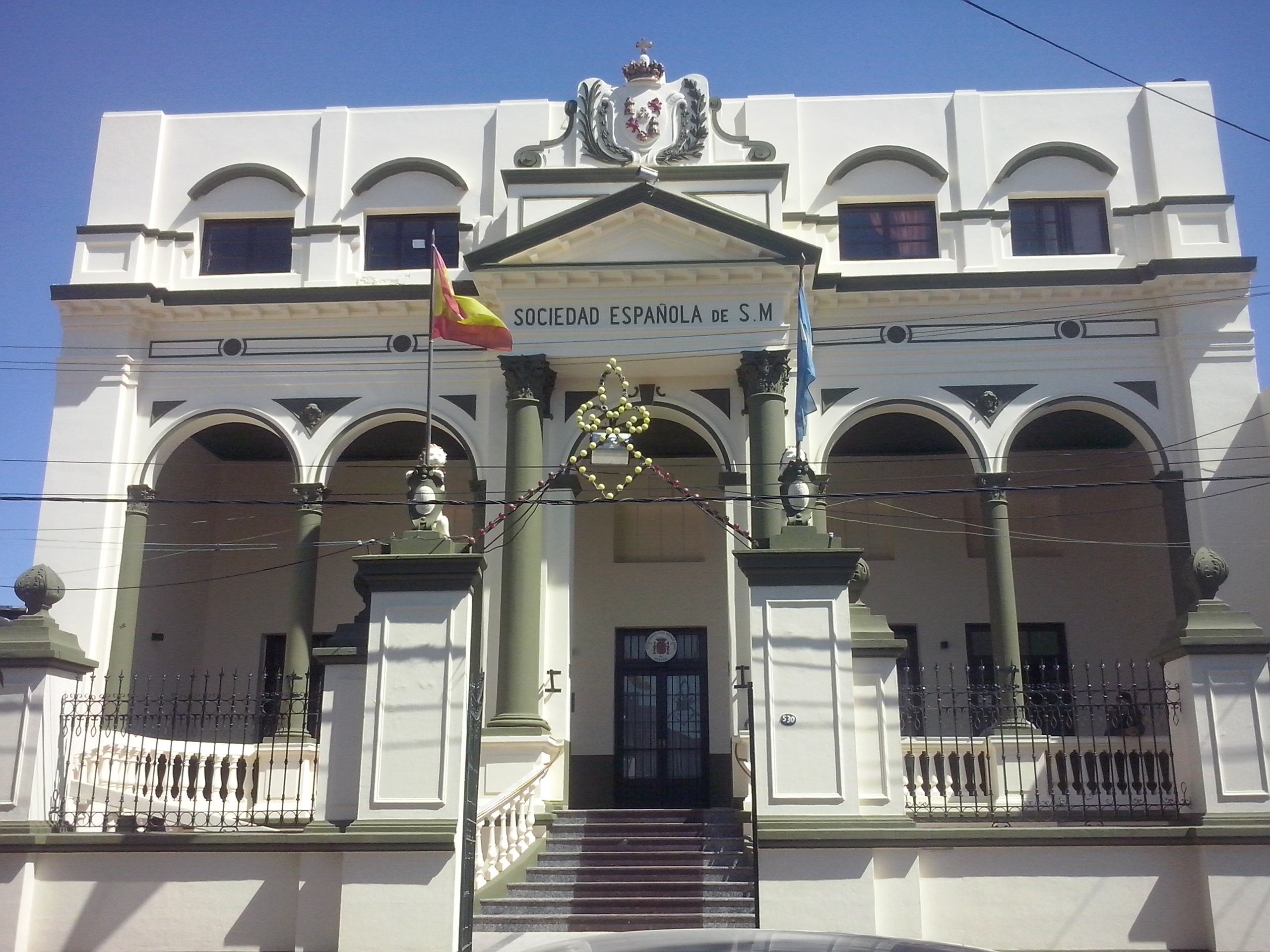 Edificio de la Sociedad Española de Socorros Mutuos